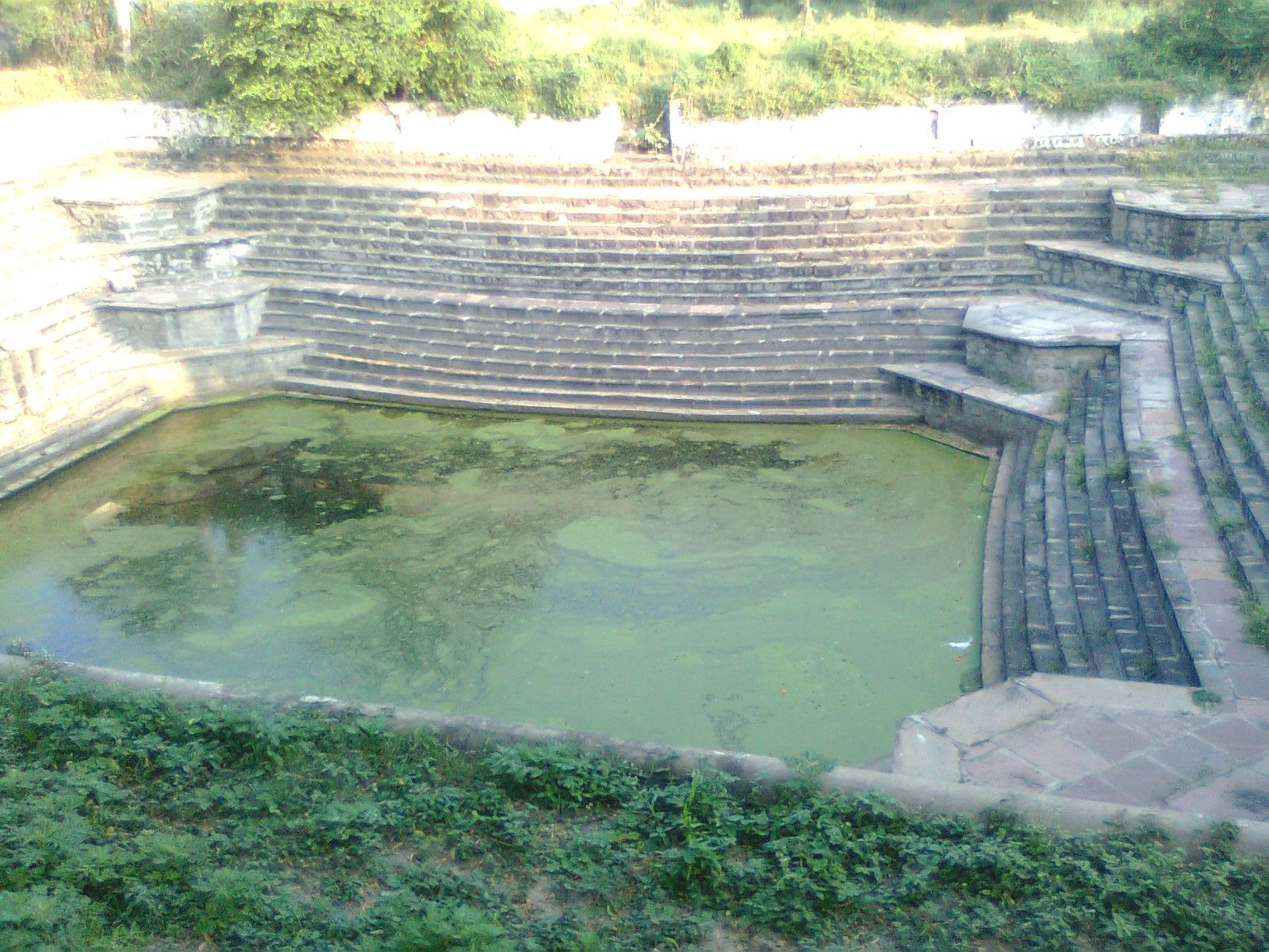 Kund at Maharshi Sandipani Ashram Ujjain